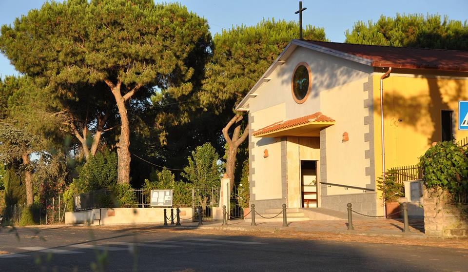 La facciata della chiesa di San Romualdo Abate a Monte Migliore.